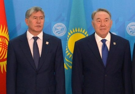 Участники заседания Совета глав государств – участников Шанхайской организации сотрудничества